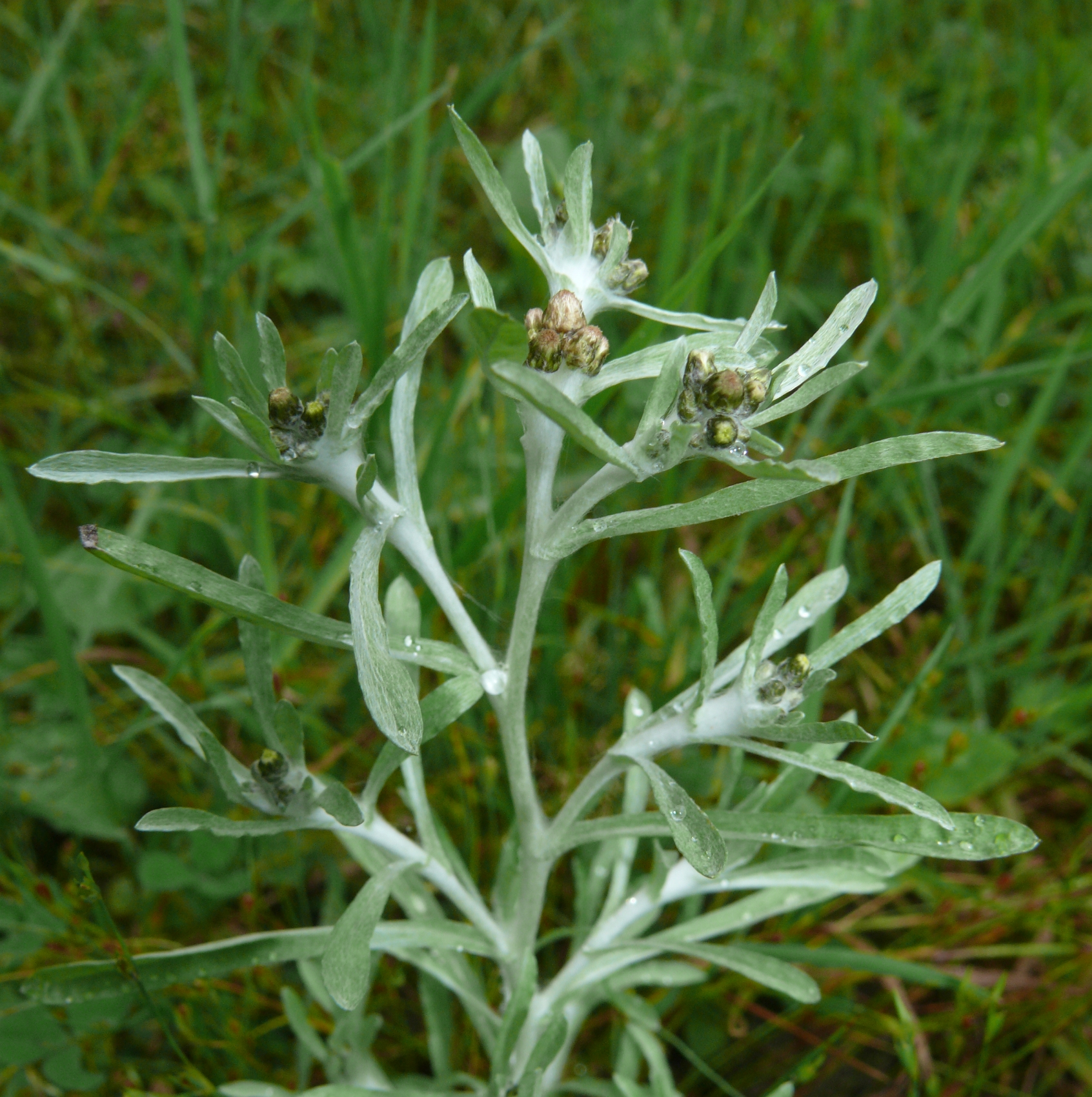 Gnaphalium uliginosum, Schwäbisch-Fränkische Waldberge, Germany